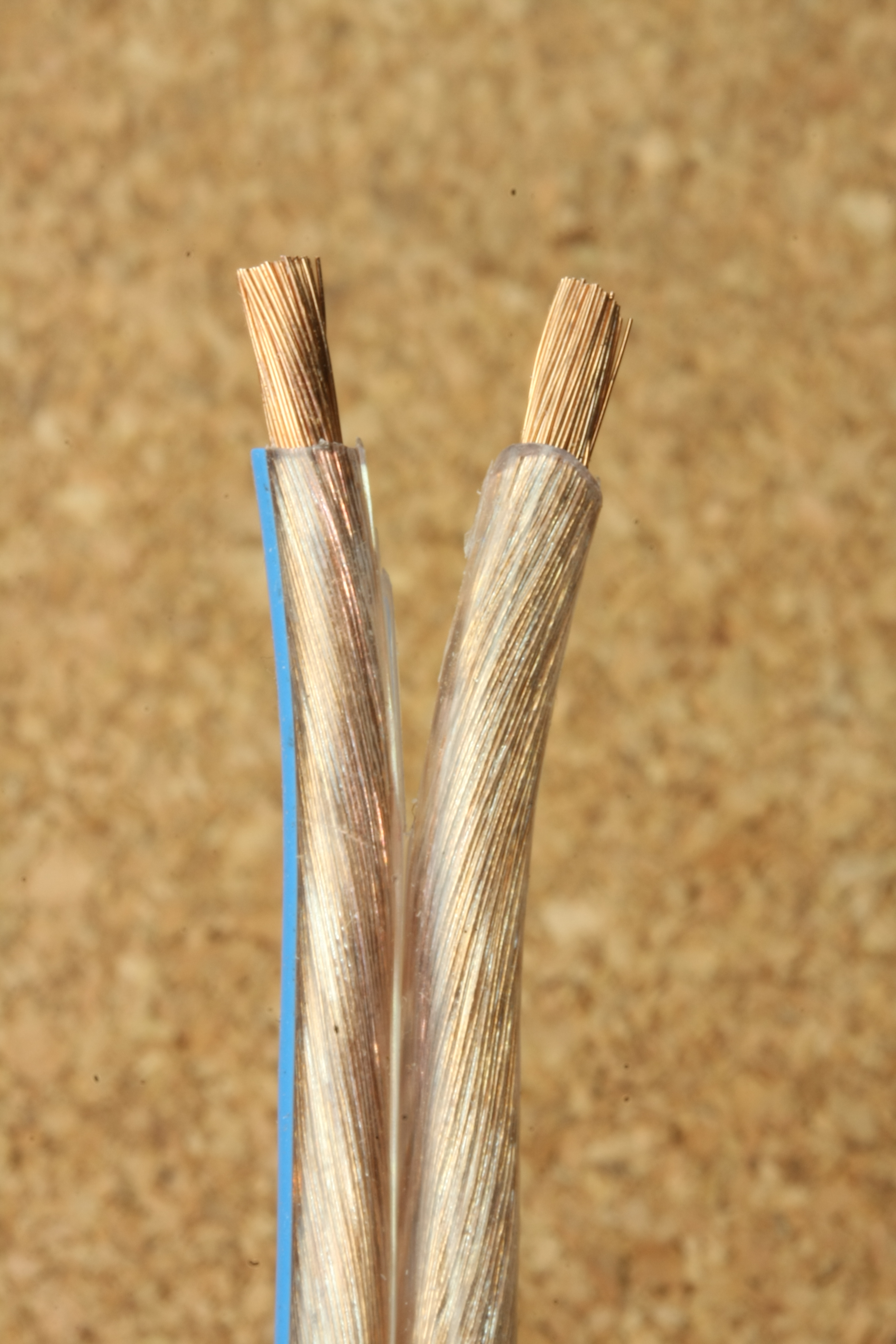 Makroaufnahme Lautsprecherkabel mit frei liegenden Adern;1,5mm² pro Ader; Kupfer; Polmarkierung in Blau.